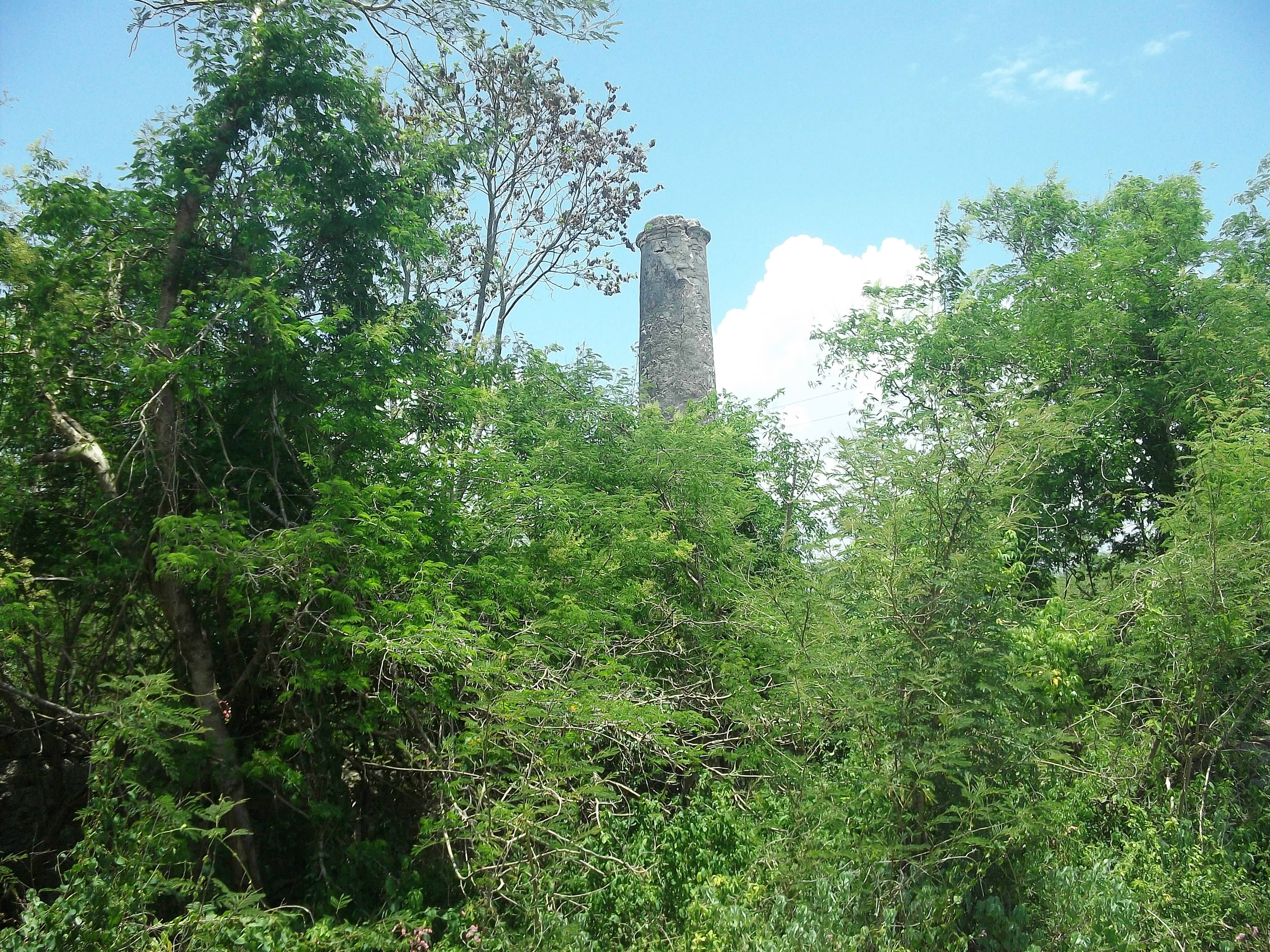 Hacienda de San José (Tixpéhual), Yucatán.